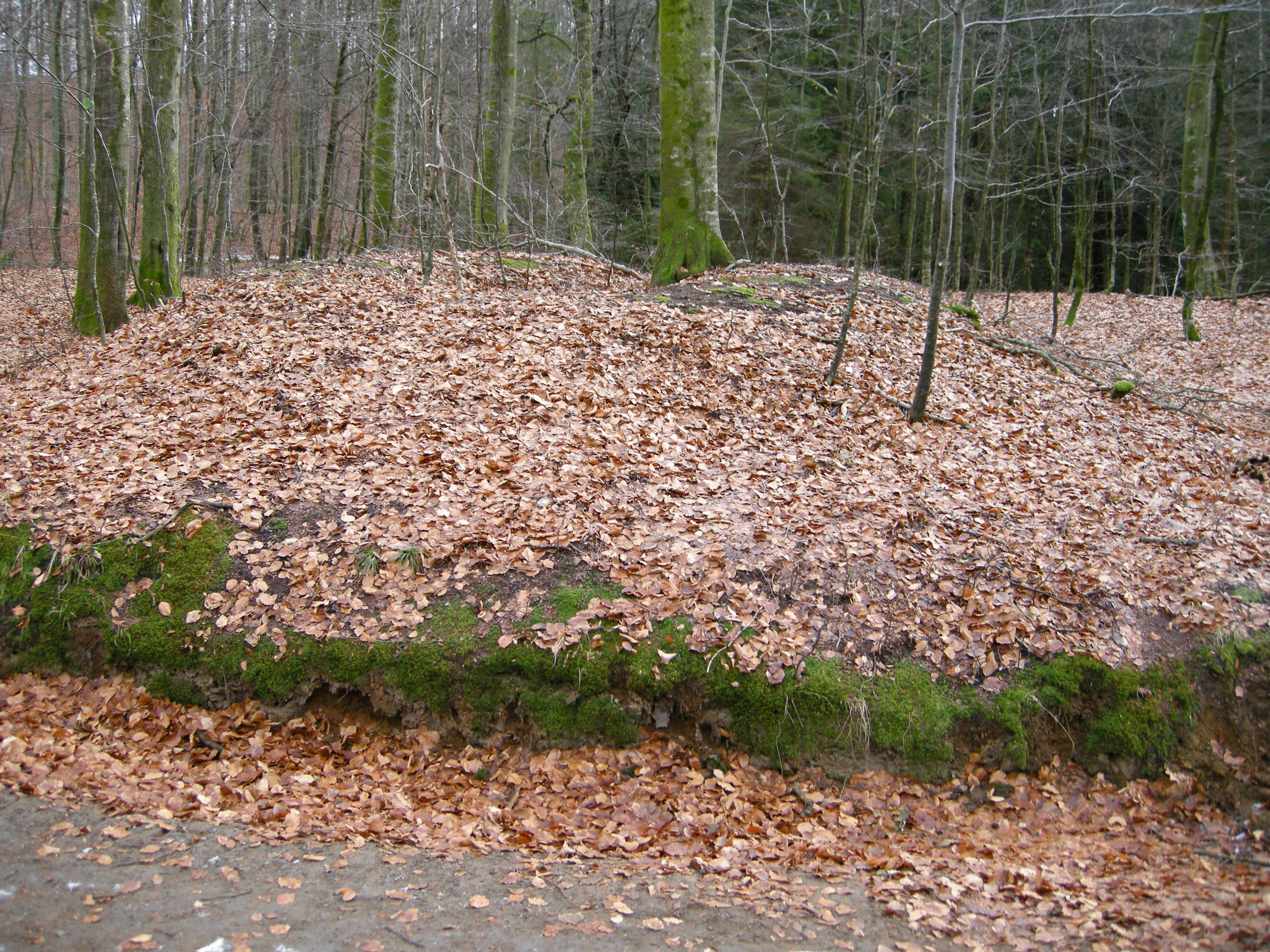 Gravhaug ved "Oldtidsveien" i Bøkeskogen i Larvik